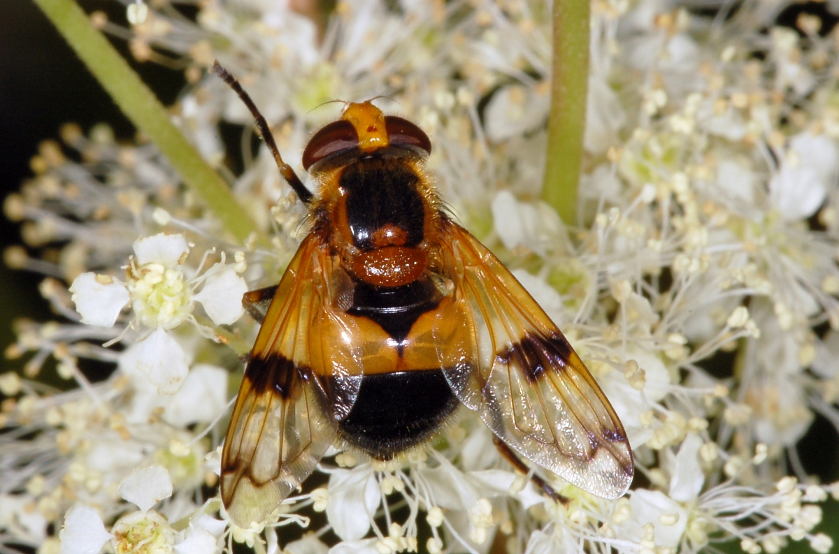 Volucella inflata, Idstein, Hessen, Deutschland